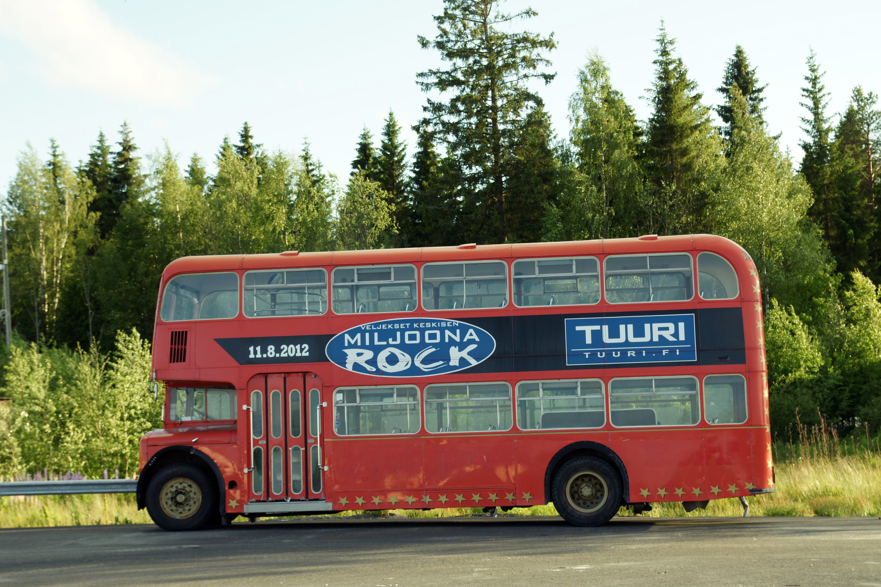 Miljoonarock-mainoksin varustettu linja-auto Tuurin kyläkaupan ympäristössä.